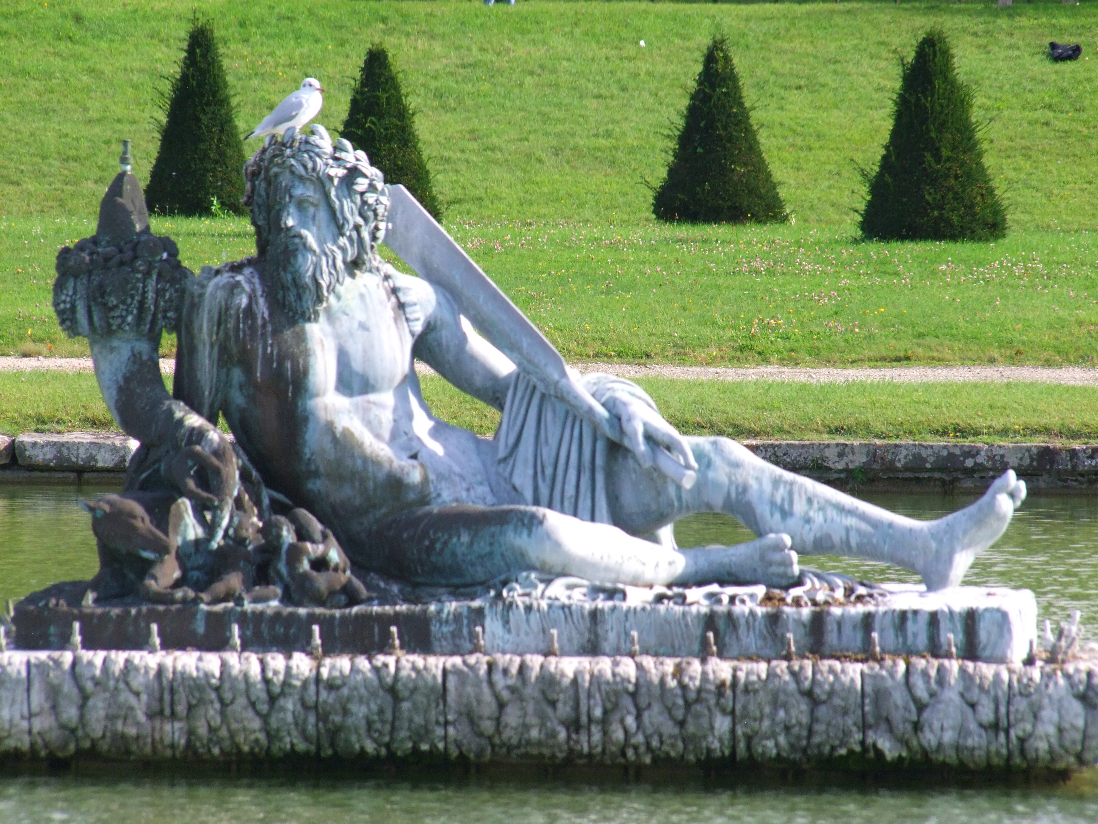 Jardin du Château de Fontainebleau .